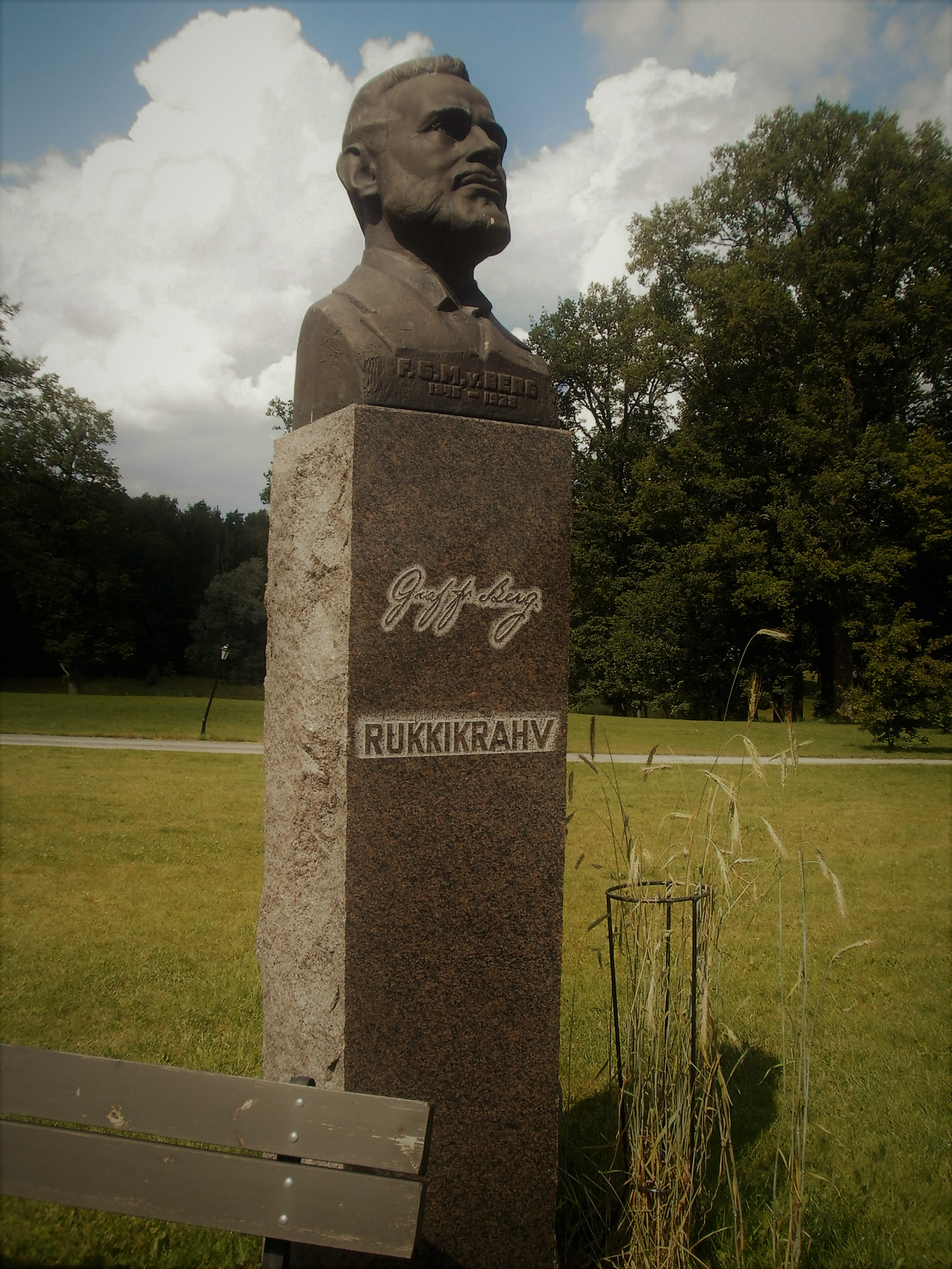 Mälestusmärk rukkiaretajale Bergile.